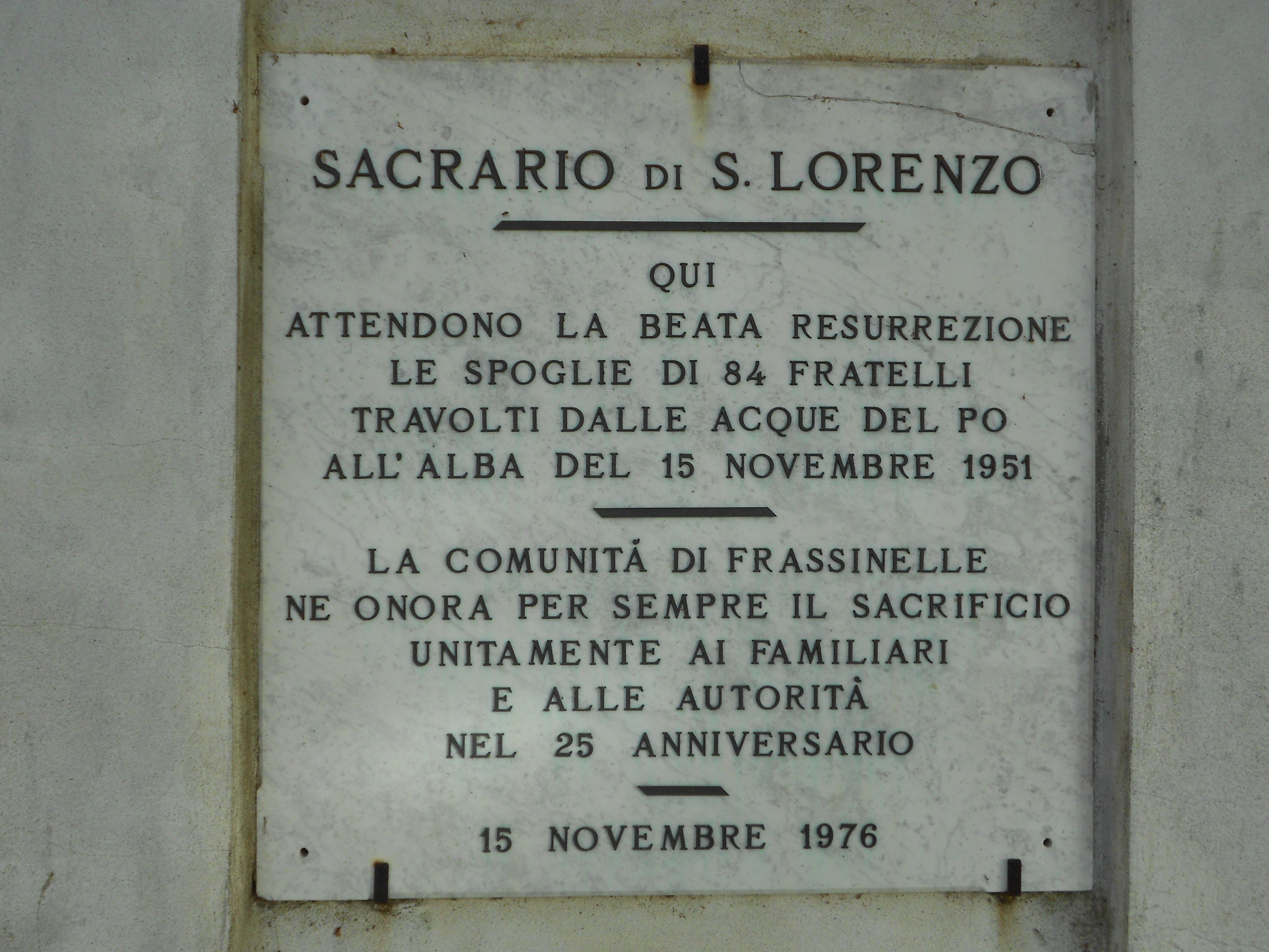 Sacrario di San Lorenzo, rotta del Po 1951, camion della morte, Passo, Frassinelle Polesine